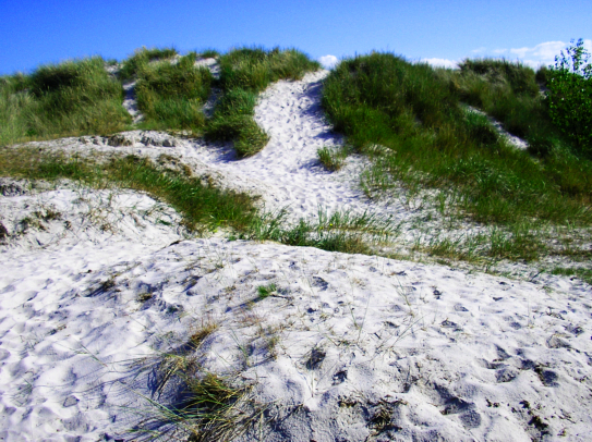 Falsterbo